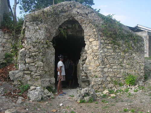 Fort marfranc